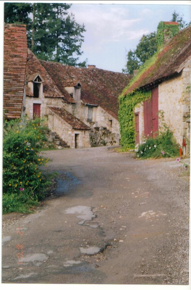 Le chemin et les vieilles maisons